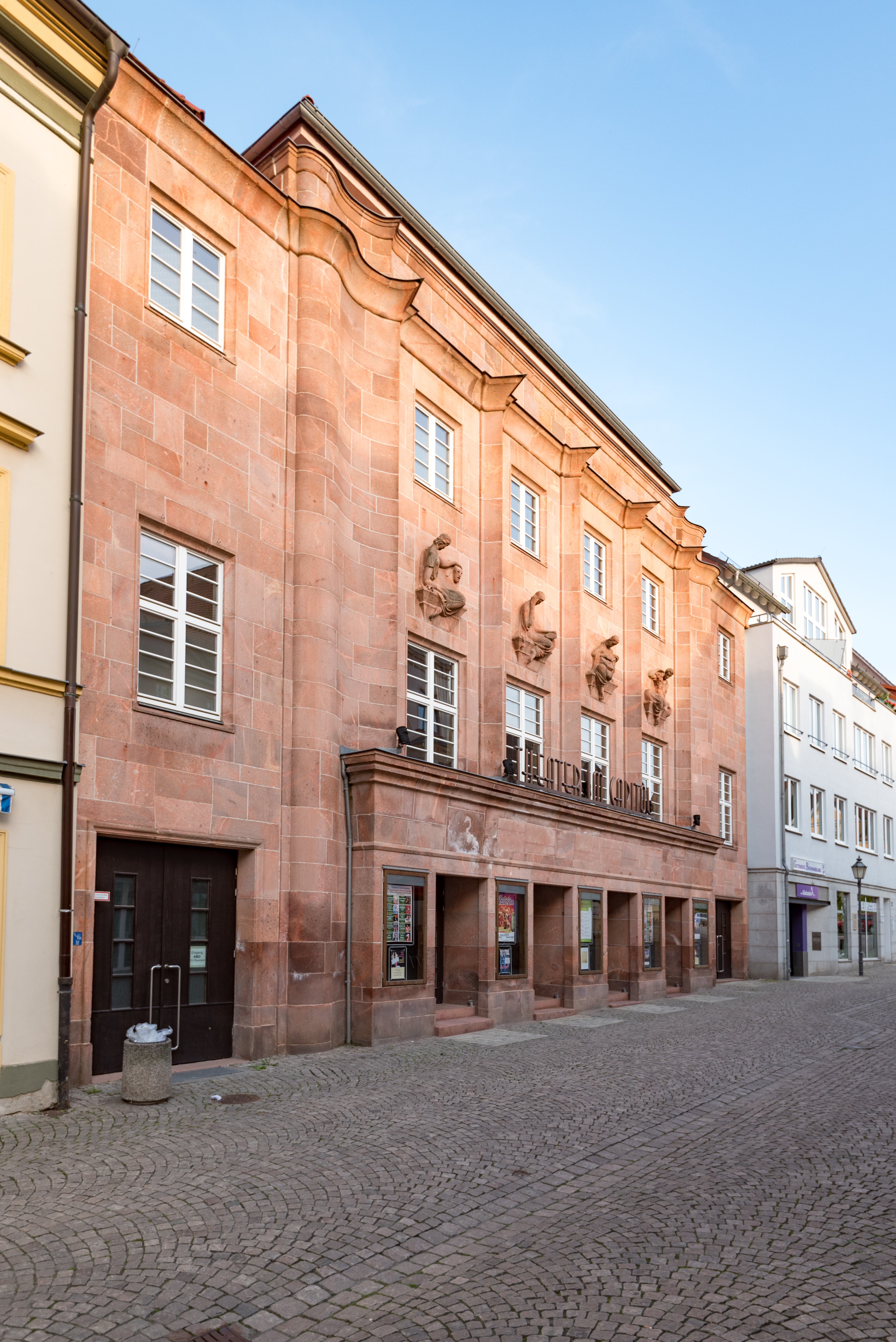 Zeitz, Judenstraße 3-4